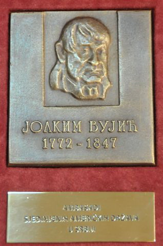 Srpski (latinica): Medaljon sa likom Joakima Vujića